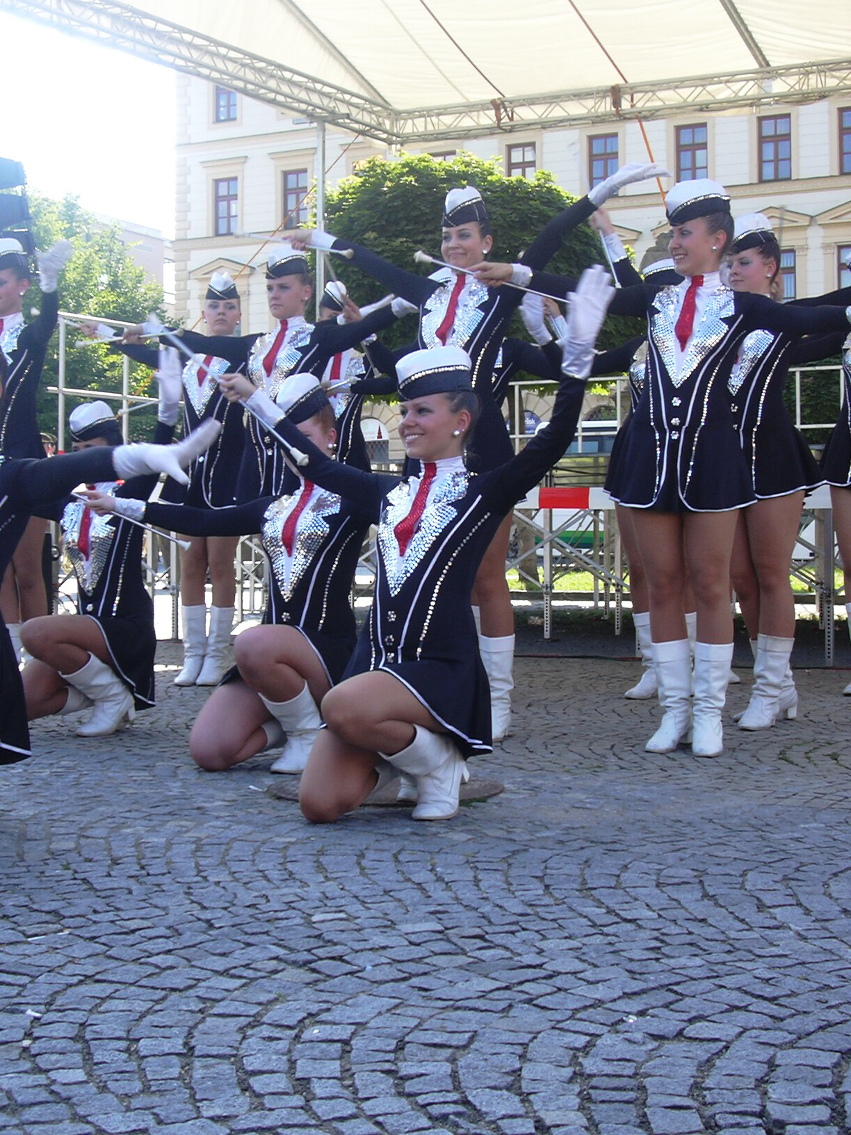 MČR_v_mažoretkovém_sportu 2008 ve Vyškově Exhibice 20.6 - 22.6.2008